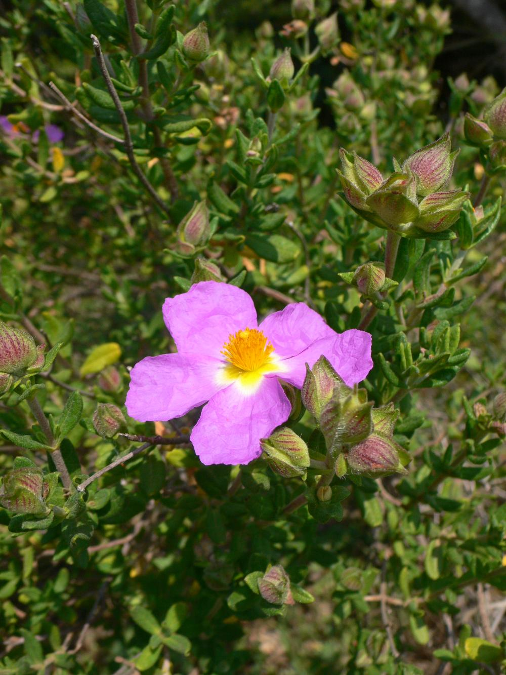 Cistus heterophyllus subsp.carthaginensis [Cistaceae]. Jara de cartagena. Especie en extremo peligro de extinción (menos de 20 ejemplares). Ejemplar de repoblación en la población de Canteras (Cartagena).